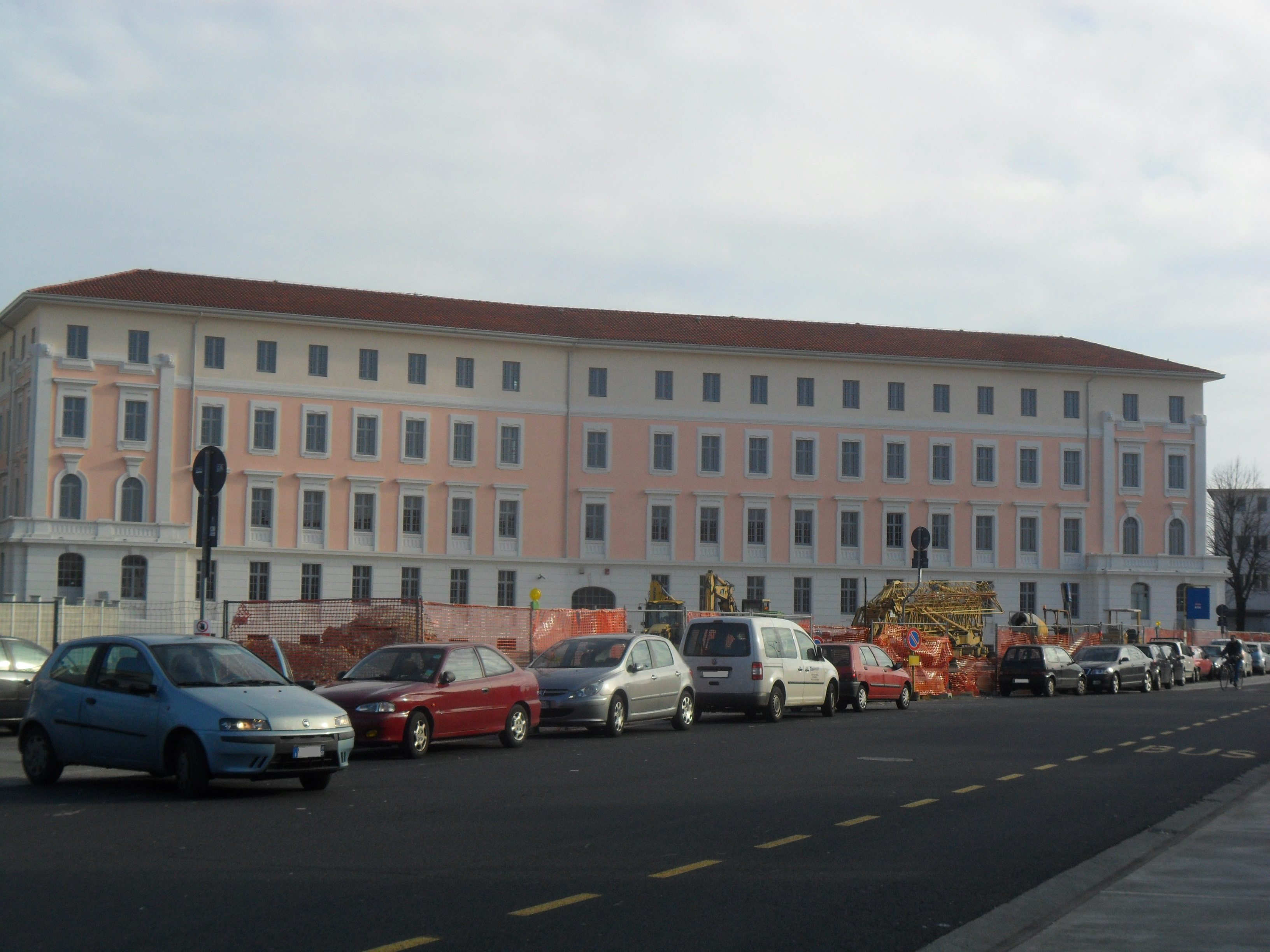 Esterno dell'ex Albergo Operai nel quartiere di Panzano a Monfalcone durante i lavori per la realizzazione del museo della cantieristica.